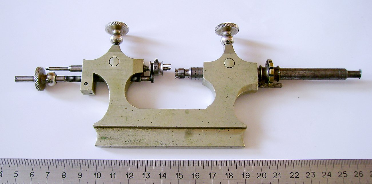 Czopiarka do polerowania czopów zegarkowych kół zębatych